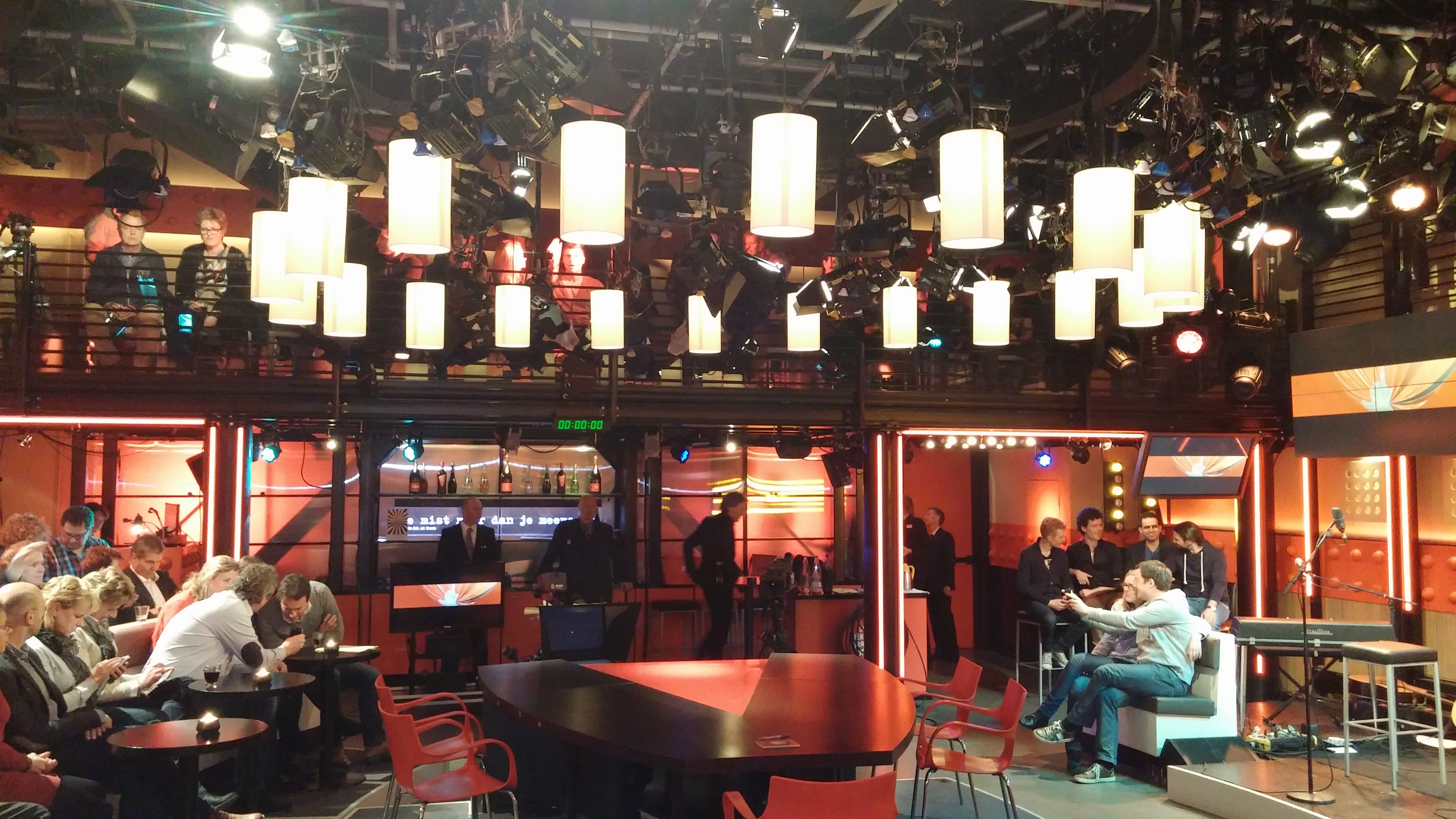 De studio van De Wereld Draait Door, in de Zuiveringshal (Oost) van de Westergasfabriek in Amsterdam.